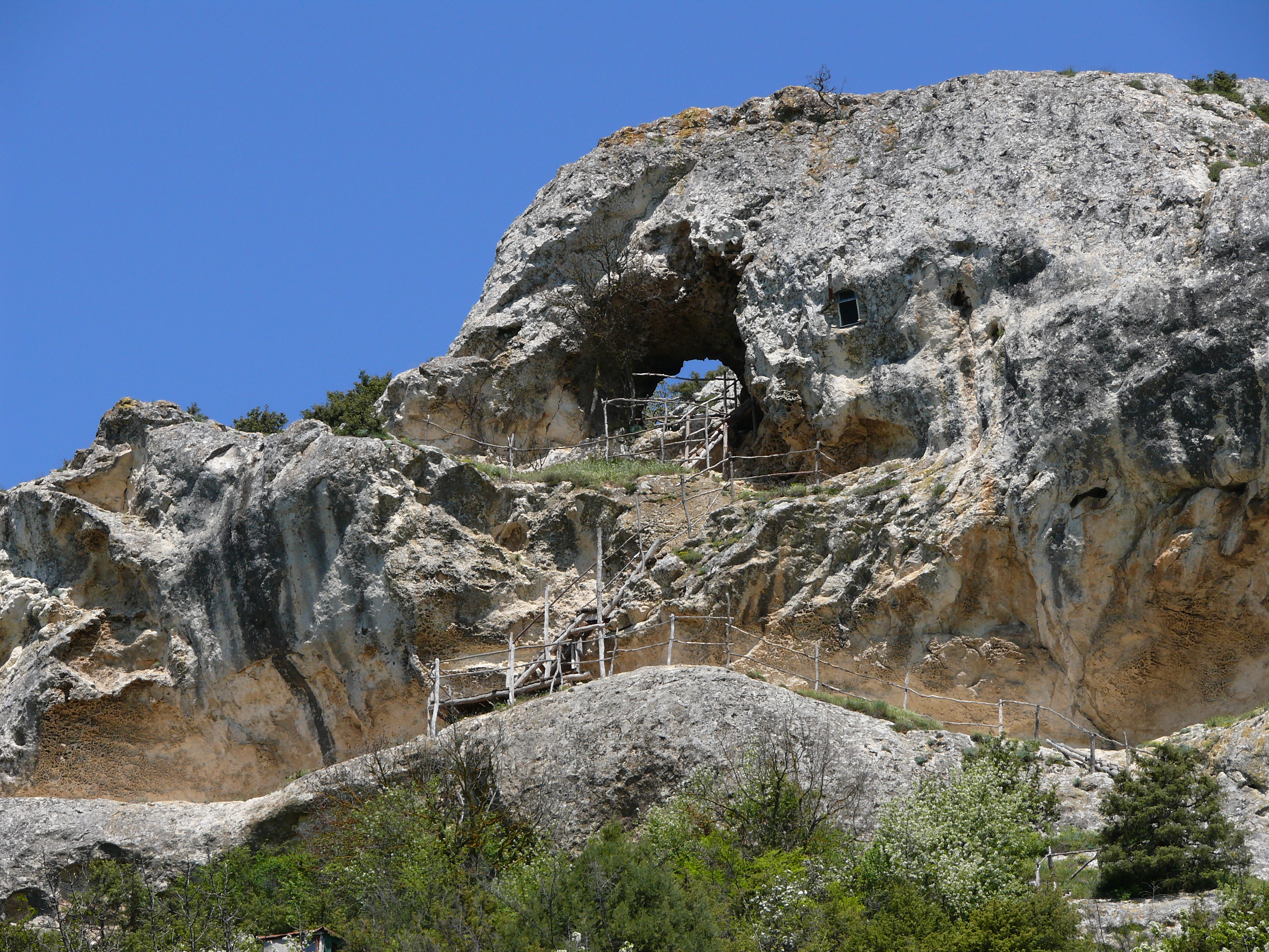 Печерний монастир "Чельтер-Мармара": 1) храм (руїни); 2) спорудження печерні господарські, Севастополь, м. Севастополь, с. Тернівка, 2,0 км на захід і північний захід від села, на північному схилі Кара-Кобинської долини